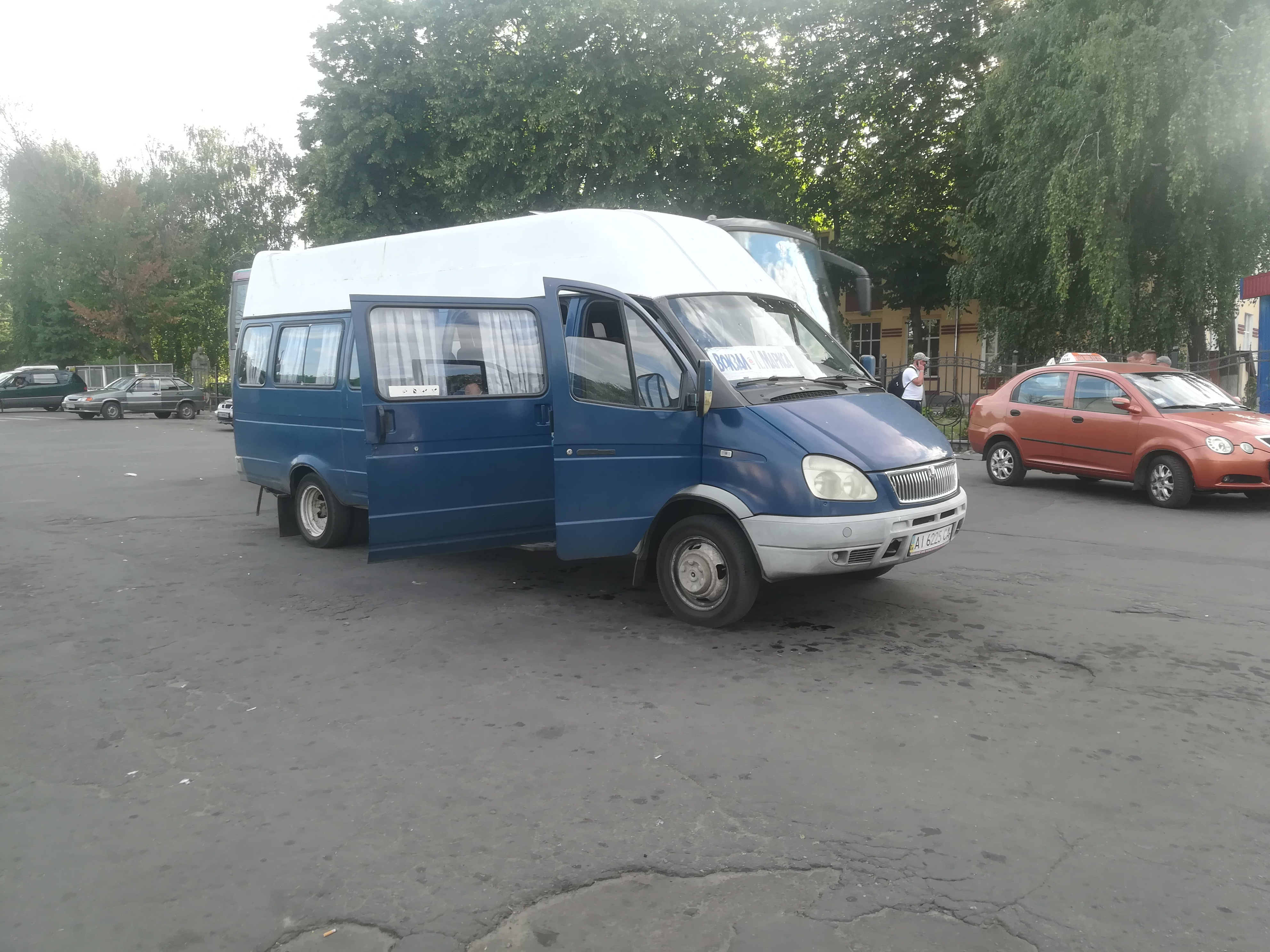 Автобус ГАЗ-2705 на Привокзальній площі у Фастові (маршрут 5)